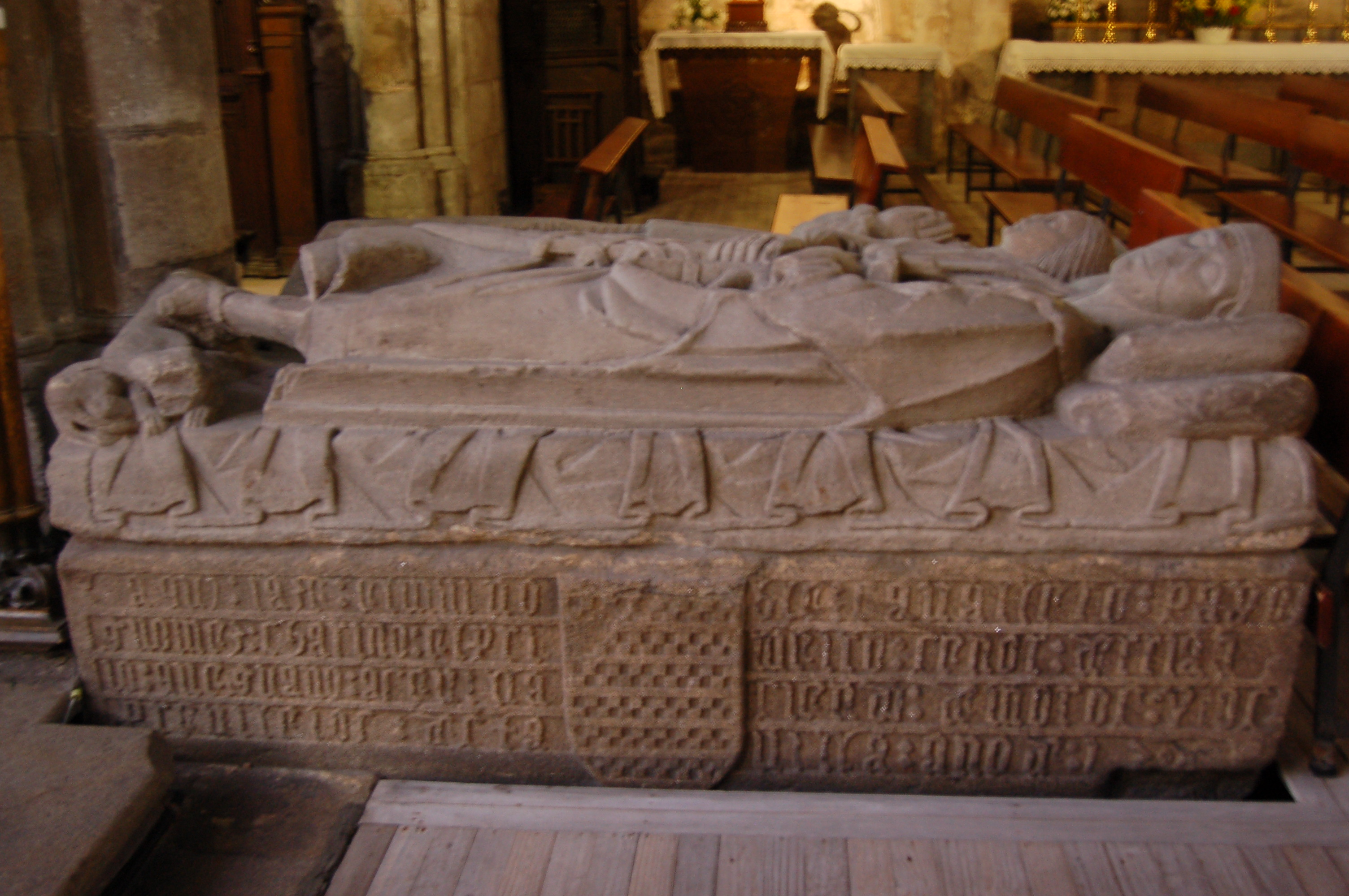 Sartego de Pai Gómez Chariño no convento de San Francisco de Pontevedra